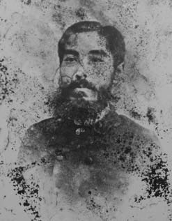 沖縄時代の西常央の写真 那覇市歴史博物館所蔵